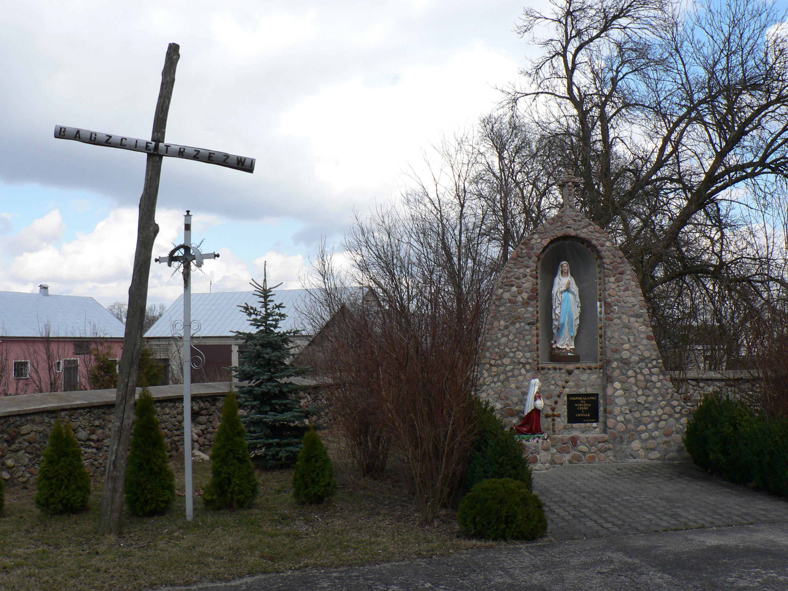 Kościół pw. Najświętszego Serca Jezusowego w Lipnikach